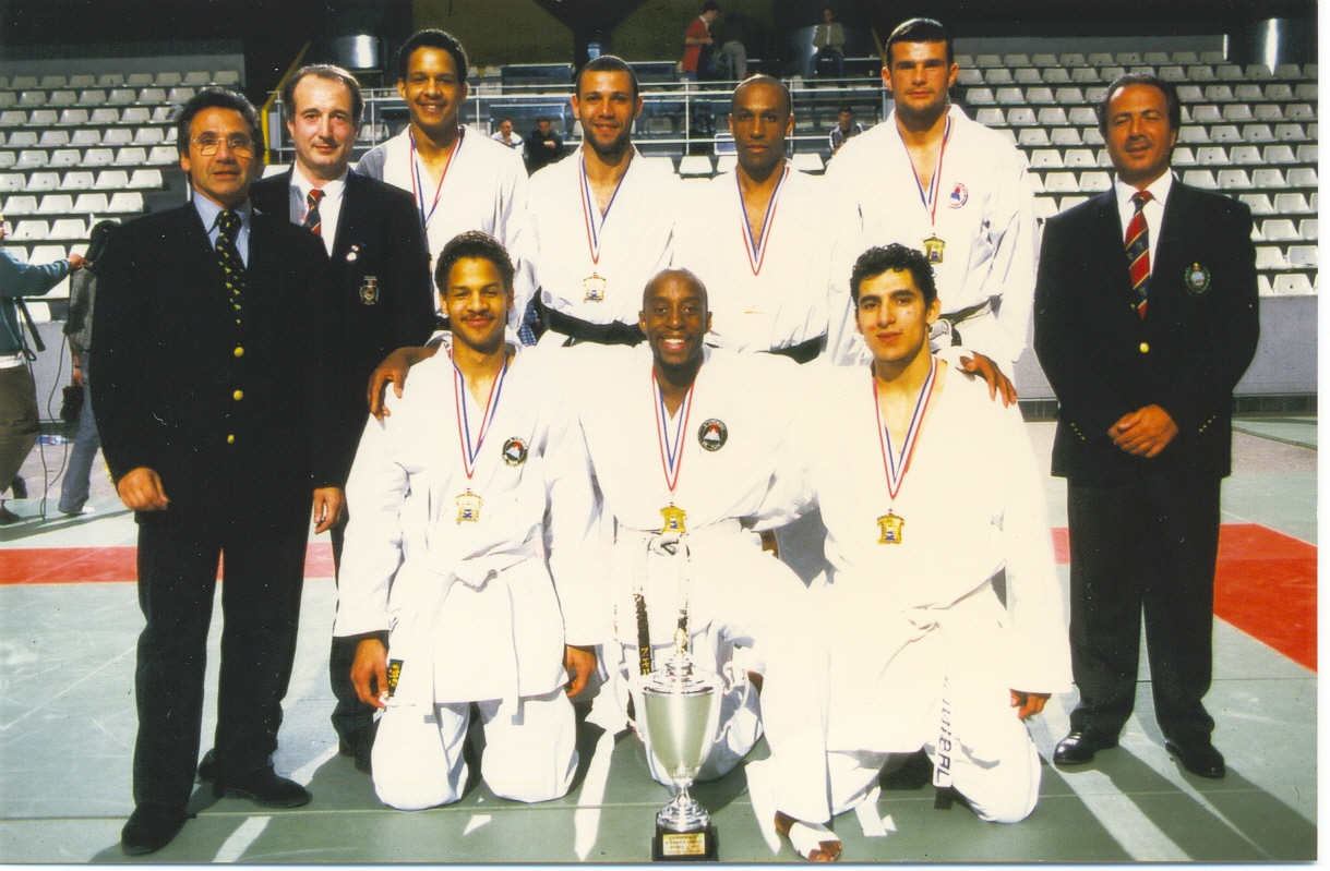 L'équipe Sporting international de karataté au stade Pierre-de-Coubertin